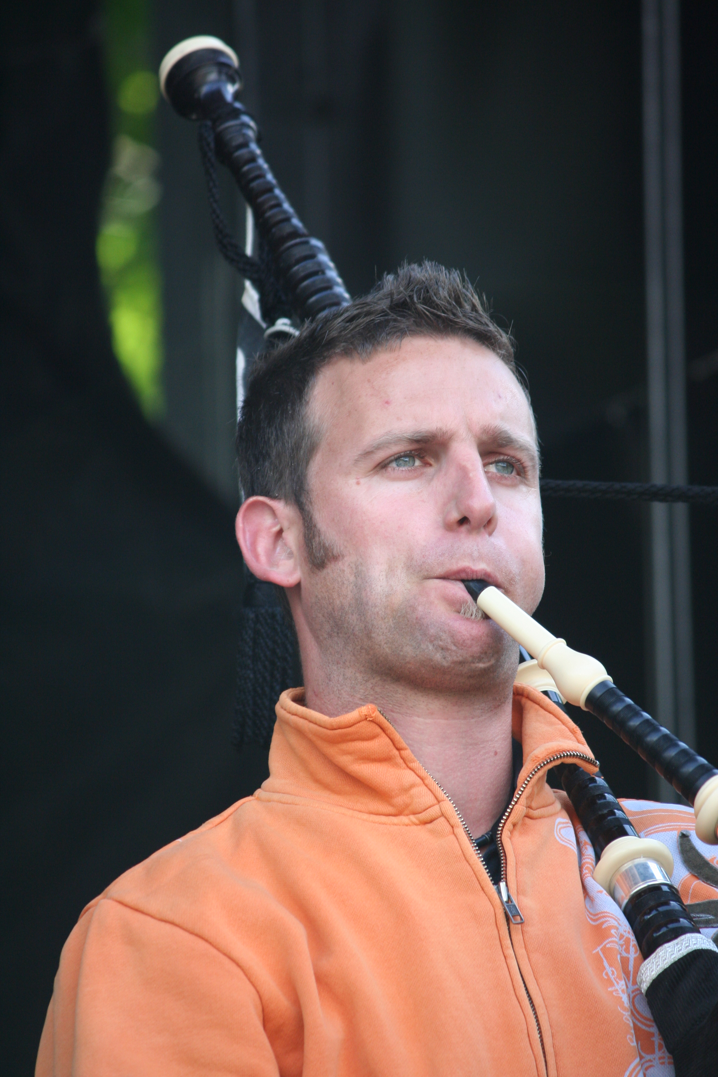 Fête de la Musique à Saint-Lô - France : Soldat Louis pendant les balances